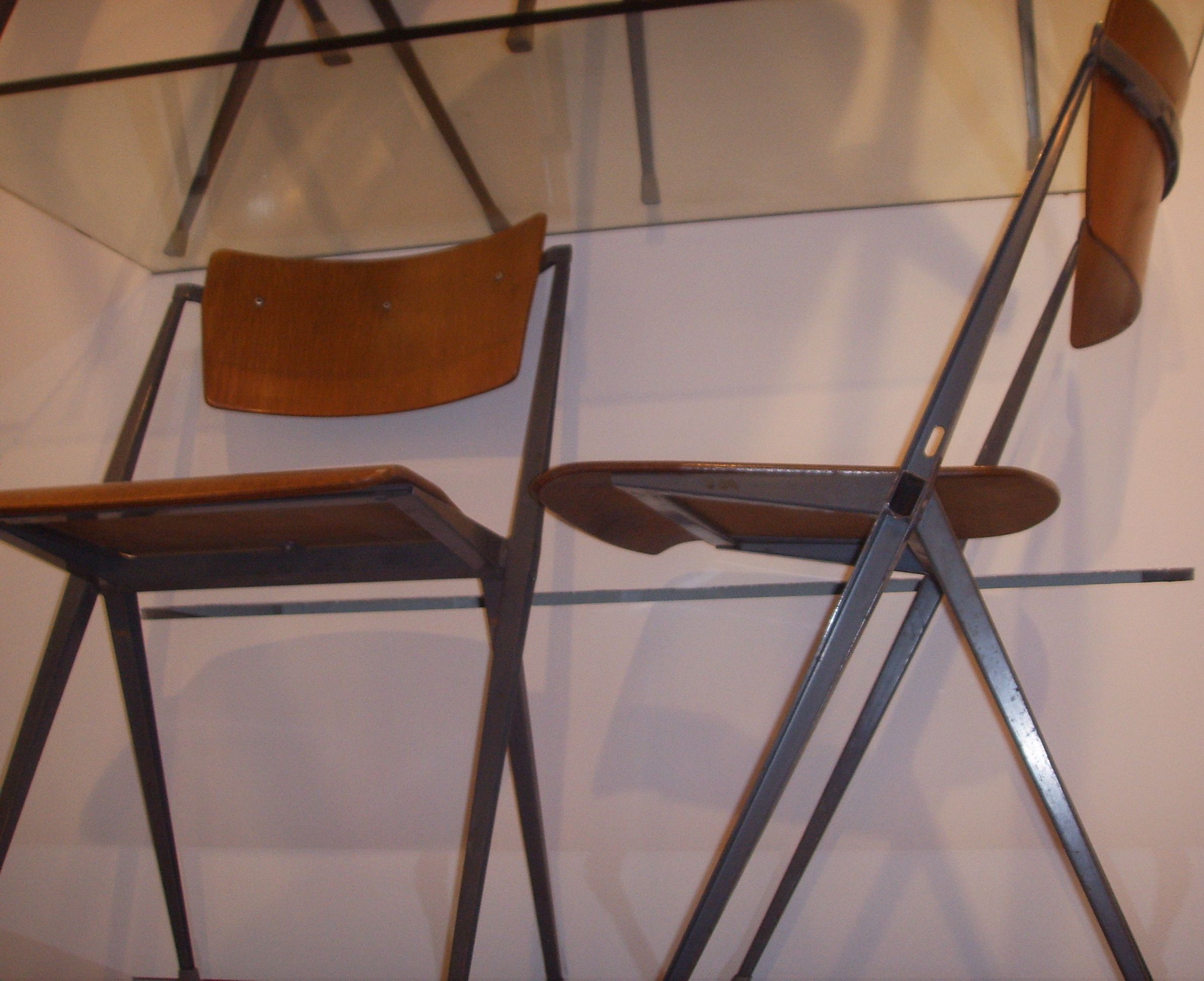 Stuhl Ahrend/De Circle von Wim Rietfeld